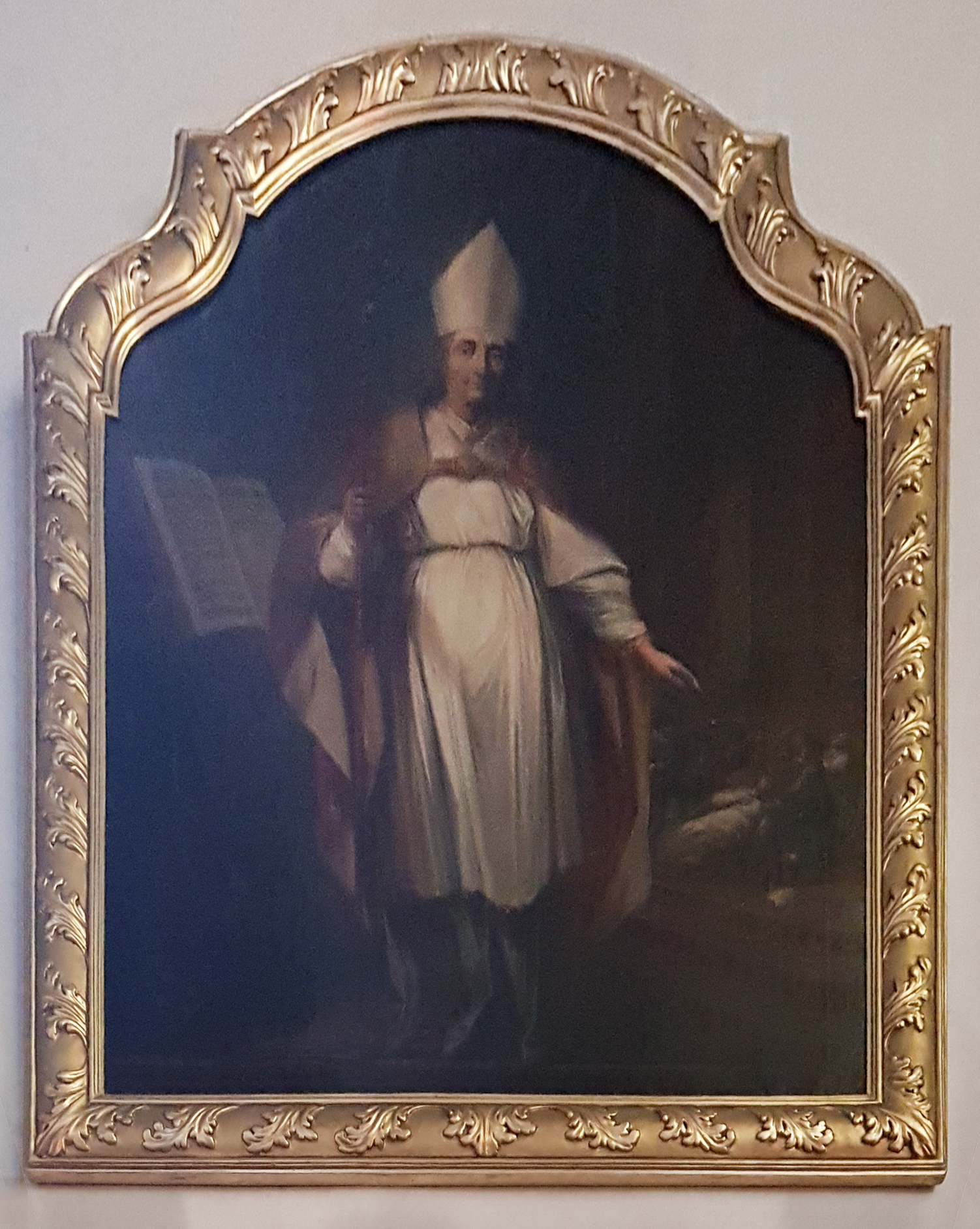 Obraz Święty Tomasz Becket. z 1715 autorstwa barokowego malarza wrocławskiego Johanna Jacoba Eybelwiesera